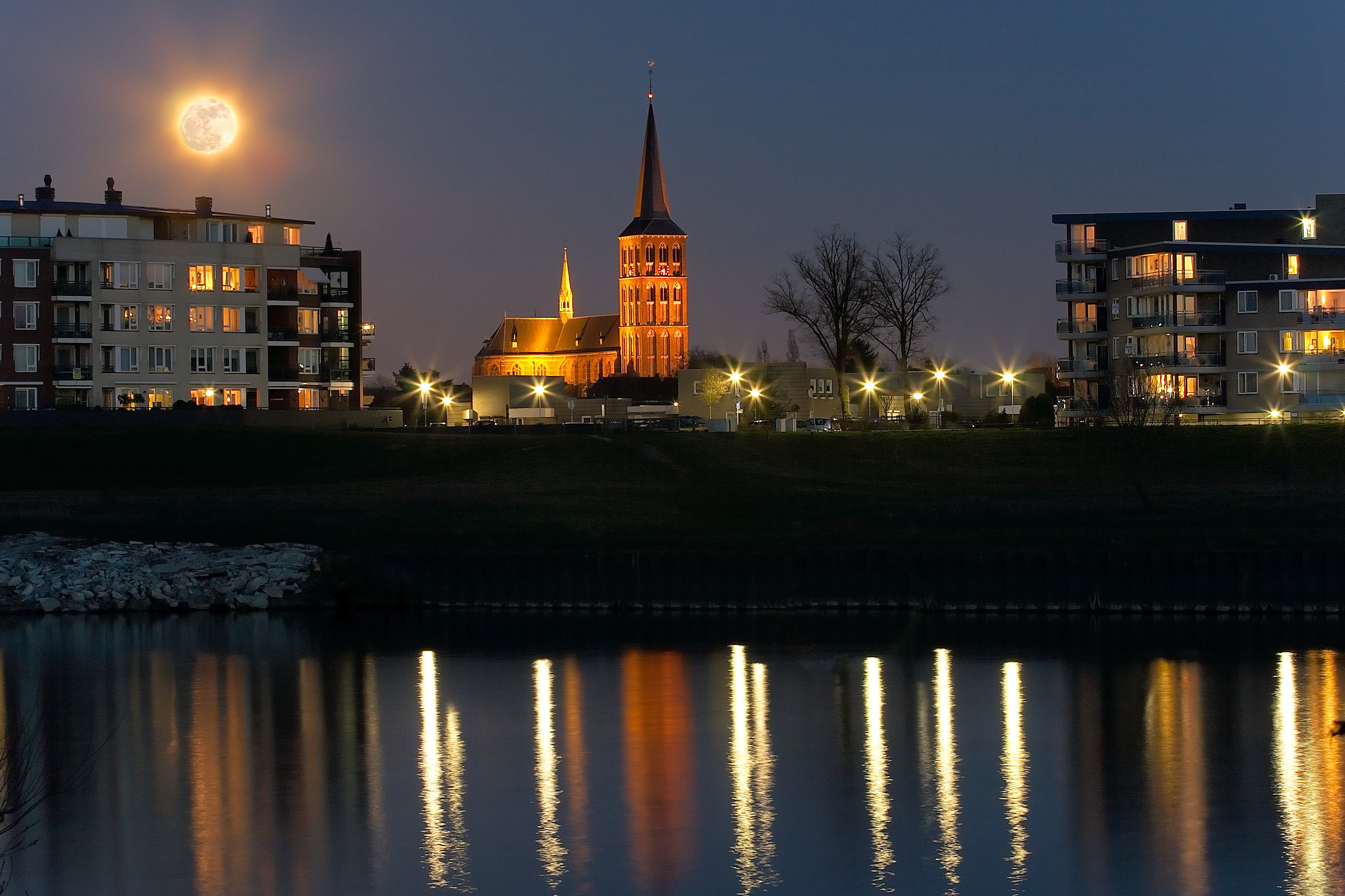 Tegelen gezien vanaf de Maas.